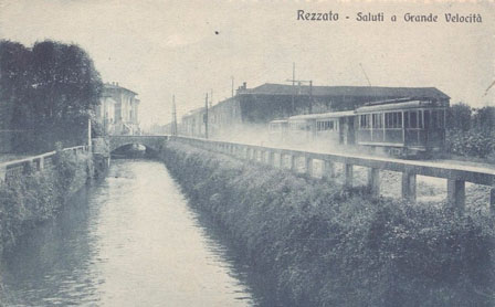 Vista di Rezzato con la tranvia Brescia-Salò e il Naviglio.